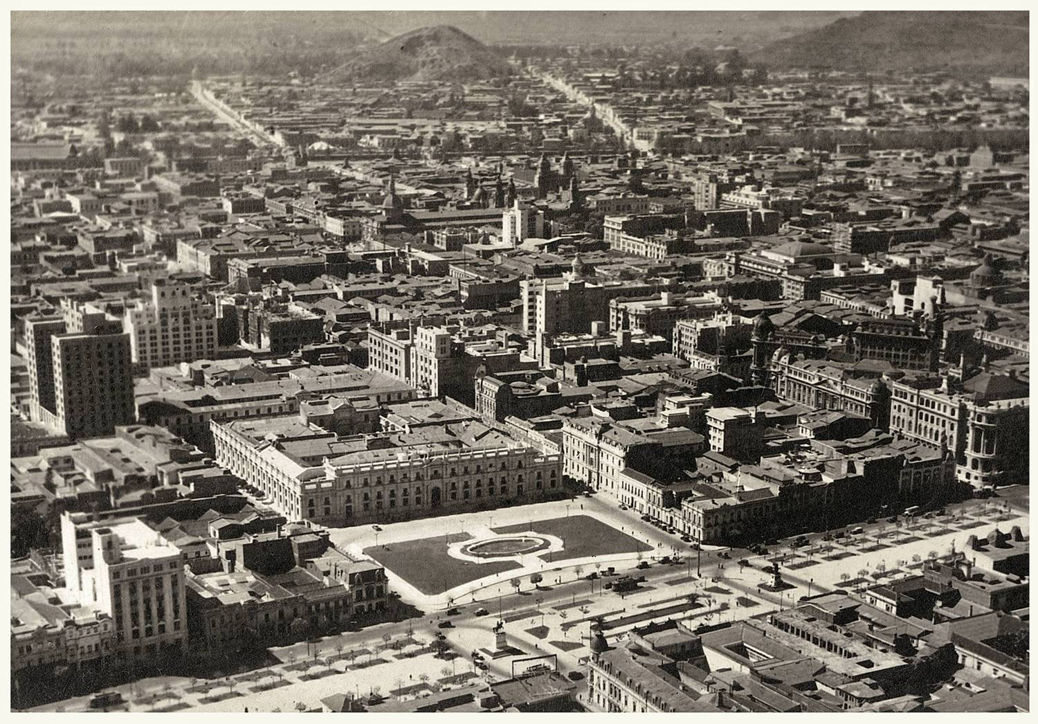 Vista del actual Barrio Cívico de Santiago de Chile hacia los años 1920.